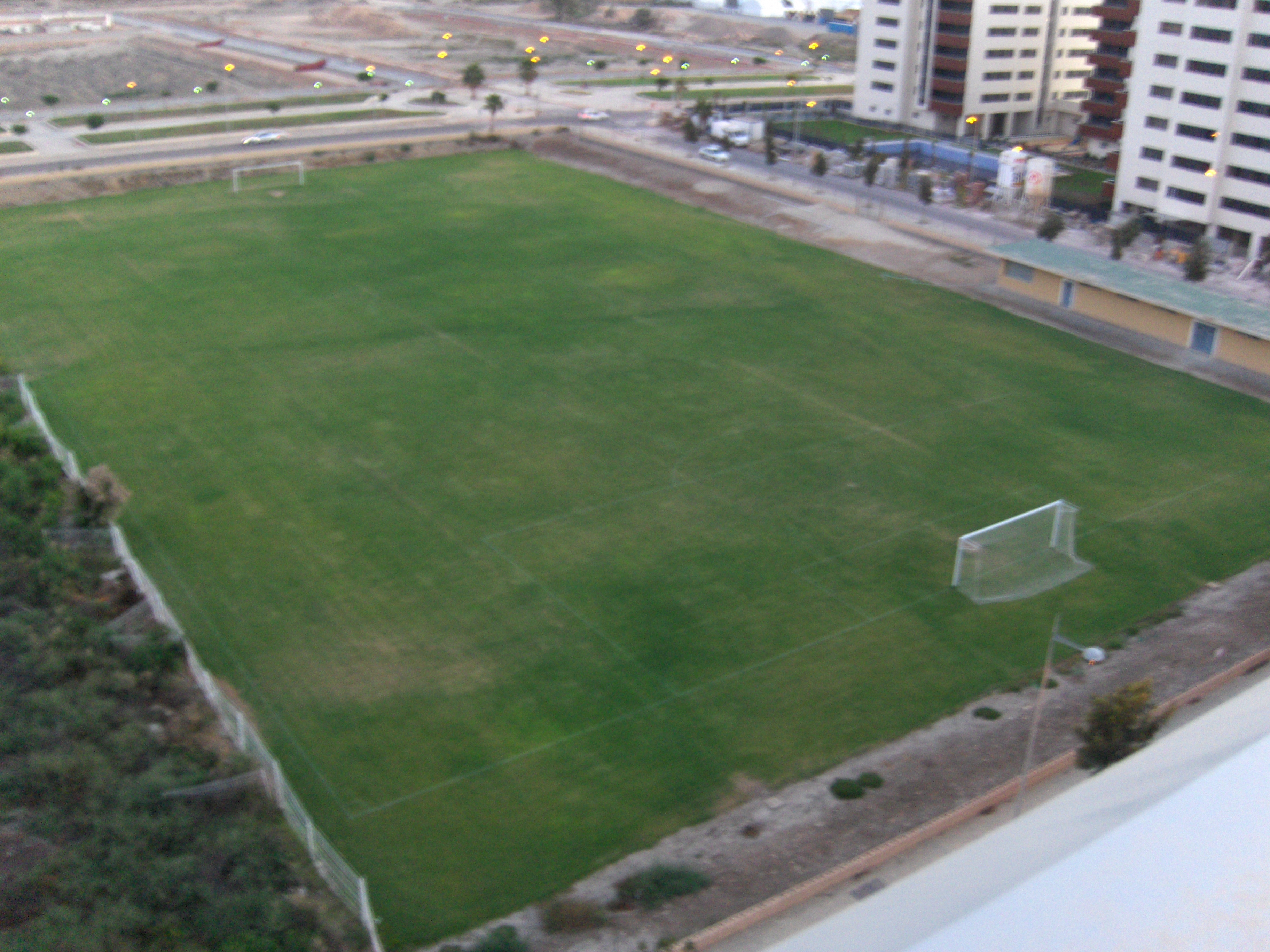 Campo de fútbol convencional para entrenamientos, propiedad de la UD Almería